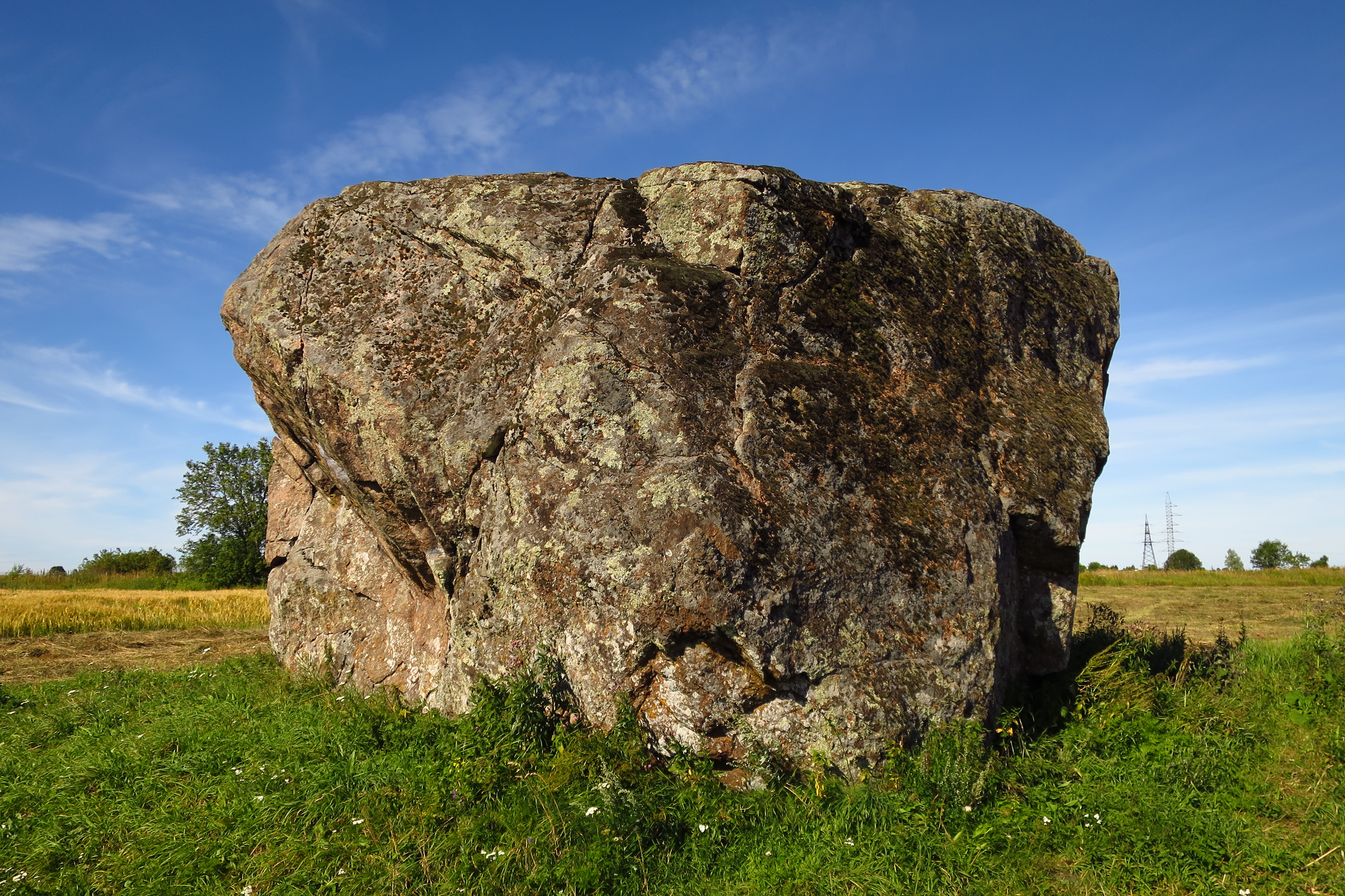 Ellandvahe kivi Rebala muinsuskaitsealal